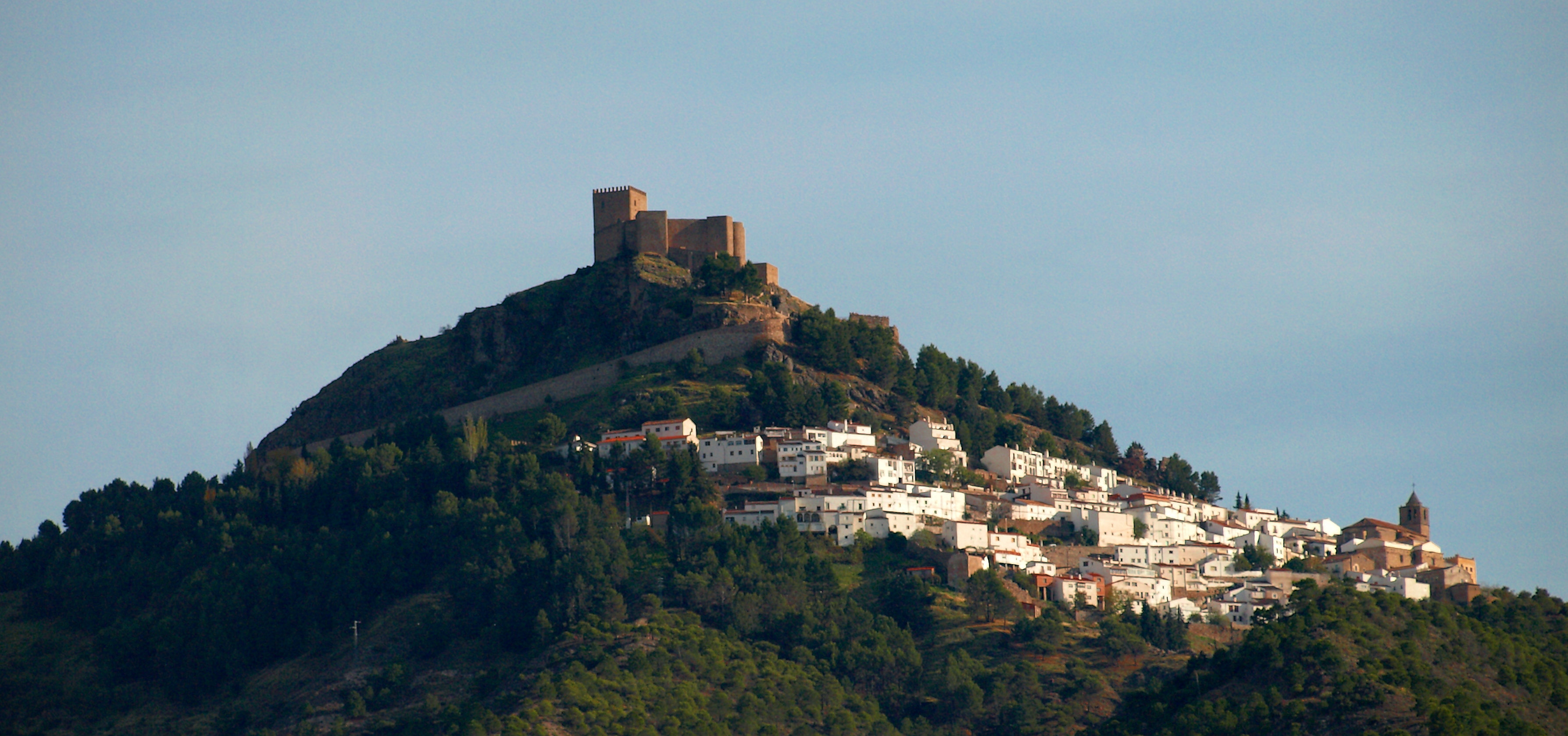 Vista de Segura de la Sierra, Jaén, Espana.